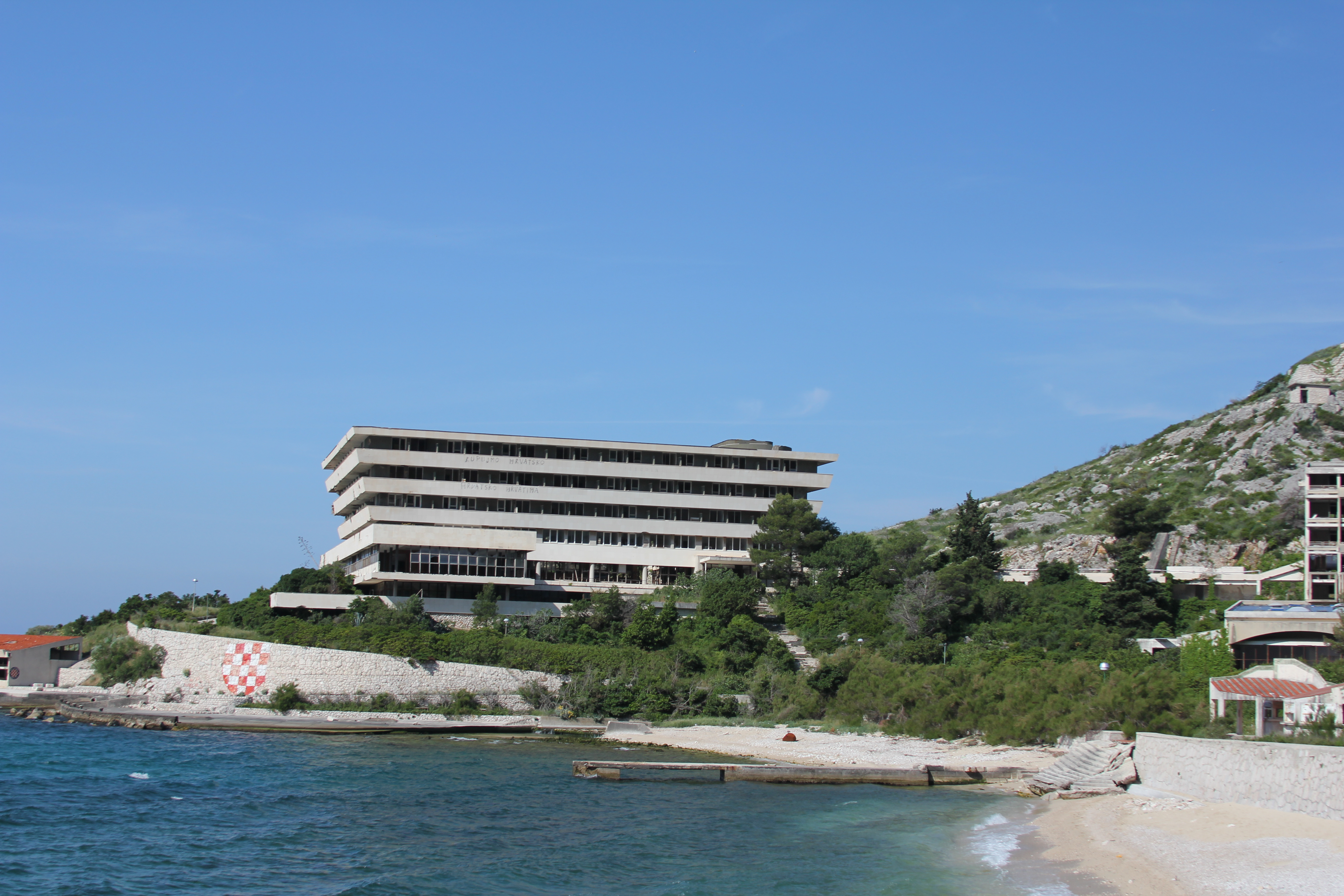 Hotel Goričina